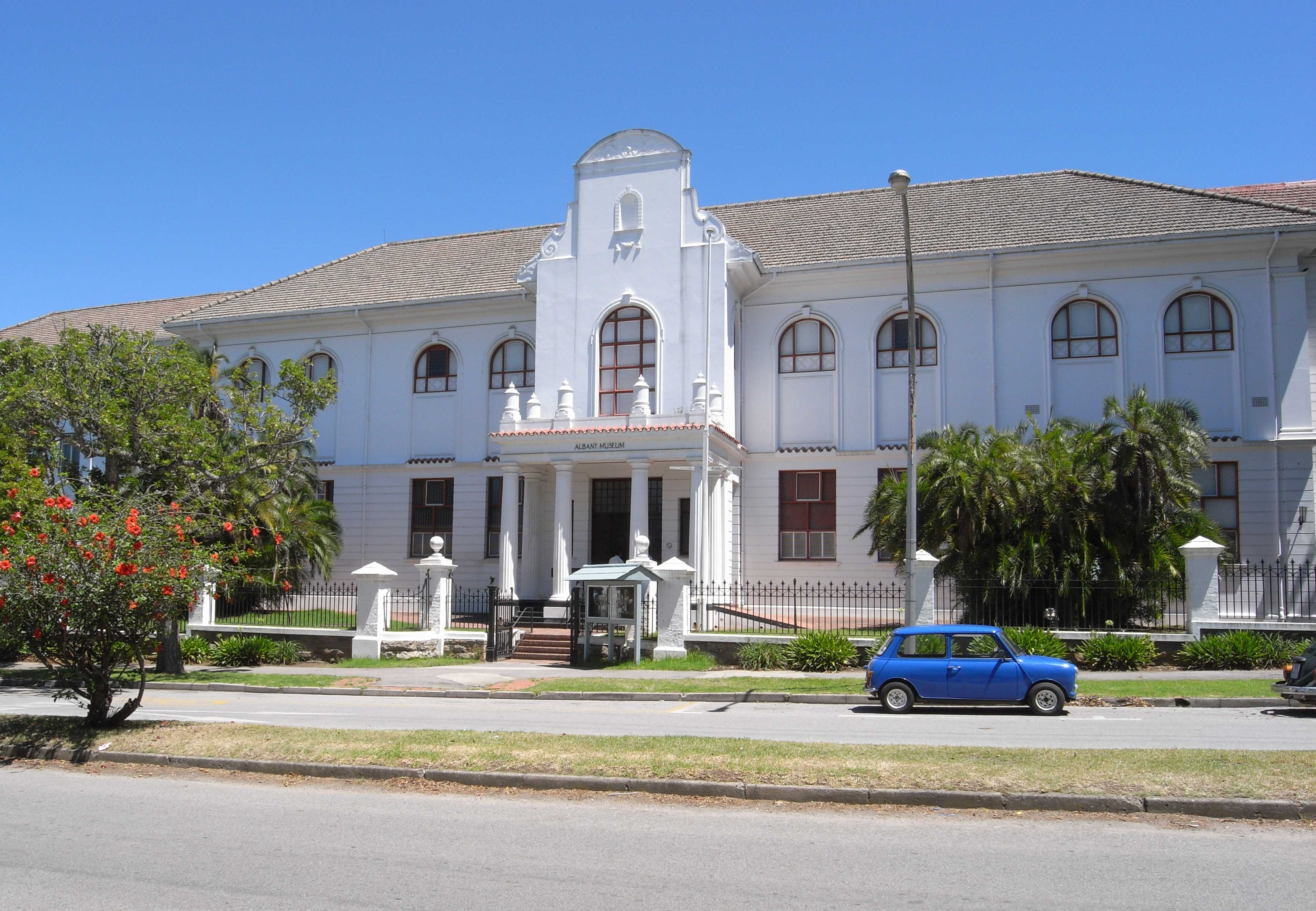 Albany Museum, Naturalhistory Department